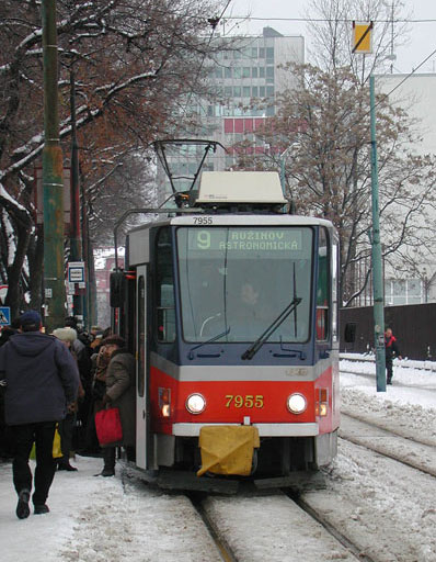 Tram T6A5 #7955+56 in Bratislava, near to Trhovisko Mileticova on stop "Zahradnicka"